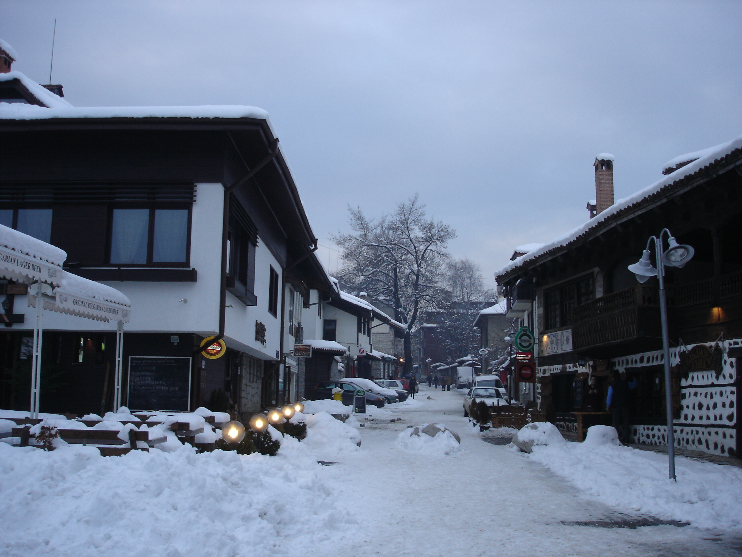 Bansko - Bulgaria, Street in December